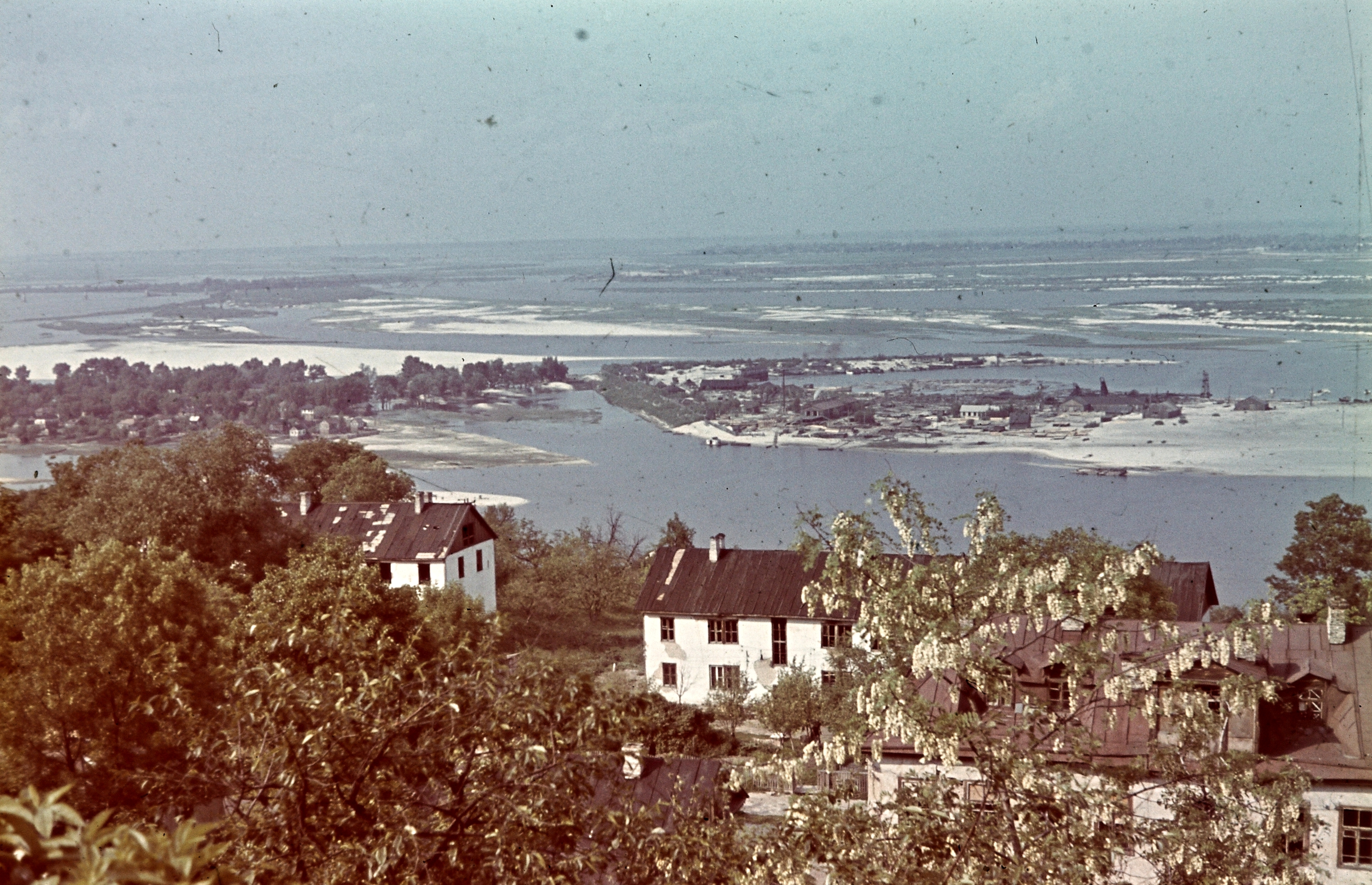 Marijinszkij park, kilátás a Dnyeper folyó felé. Location: Ukraine, Kiev Tags: colorful, flood Title: Marijinszkij park, kilátás a Dnyeper folyó felé.